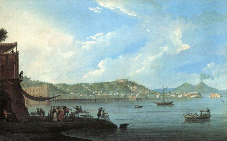 Gouache di Saverio della Gatta del 1785 raffigurante una veduta di Napoli da Posillipo con il Vesuvio. Sono visibili palazzo donn'Anna, castel Sant'Elmo e castel dell'Ovo.Unknown